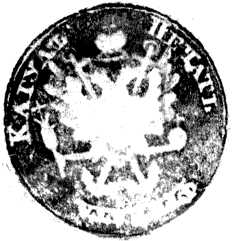 Оттиск печати фрегата Кагул